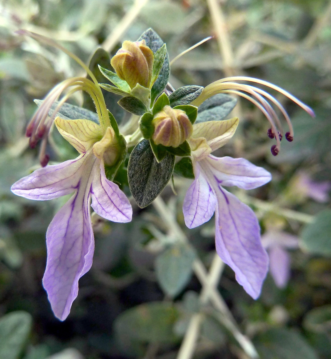 Teucrium fruticans (Olivilla) : Flores y botones - Cultivo urbano/ornamental : Pza de Legazpi, Madrid (España).